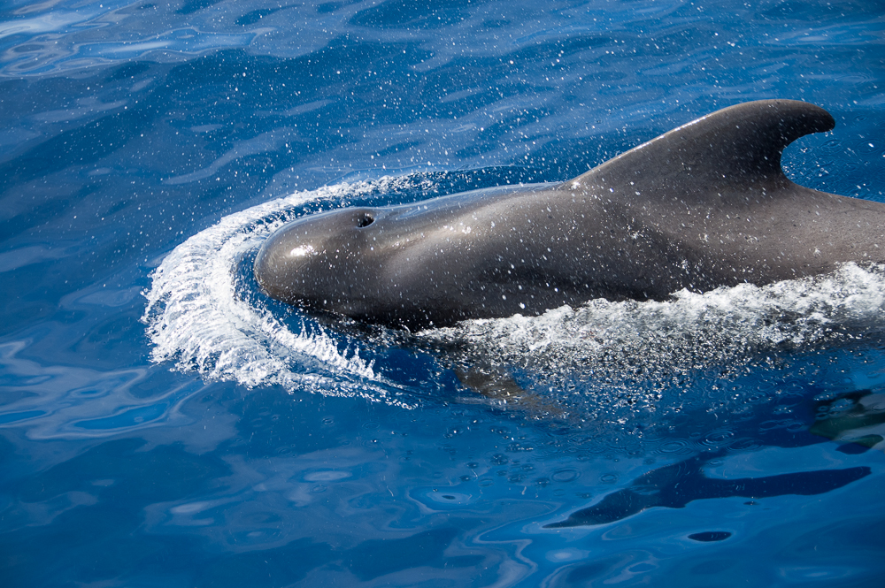 Calderón tropical en las aguas de Tenerife